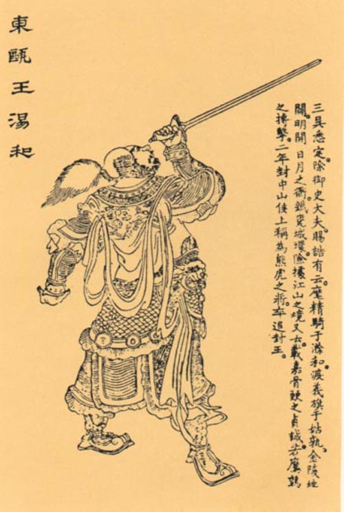 汤和，明朝军事將領。